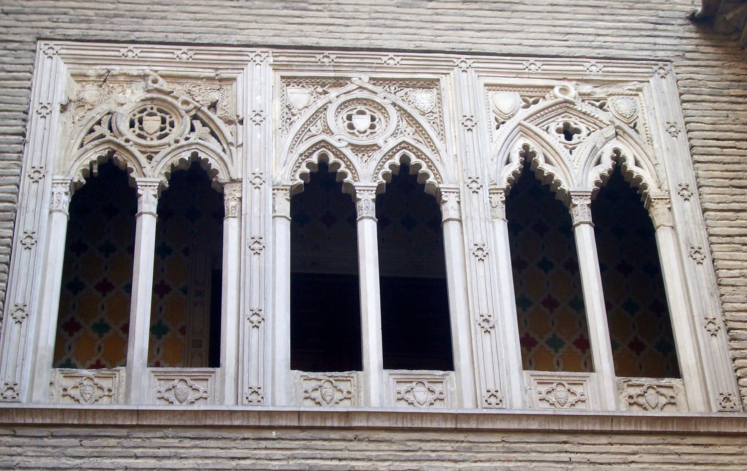 Galería del Arco del Deán (Zaragoza)